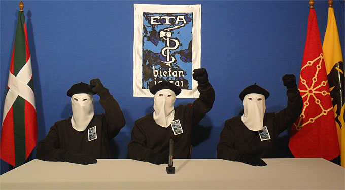 publicdomain Euskadi Ta Askatasuna (ETA) 2011ko urriaren 20an, Euskadi Ta Askatasuna (ETA) erakunde armatuak "jarduera armatua behin-betiko amaitzea erabaki" zuela jakinarazi zuen "Berria" eta "Gara" egunkarietara bidalitako bideoen bidez. Bideoa Donostian egindako Bakerako Nazioarteko Konferentzia eta hiru egunetara kaleratu zuten.